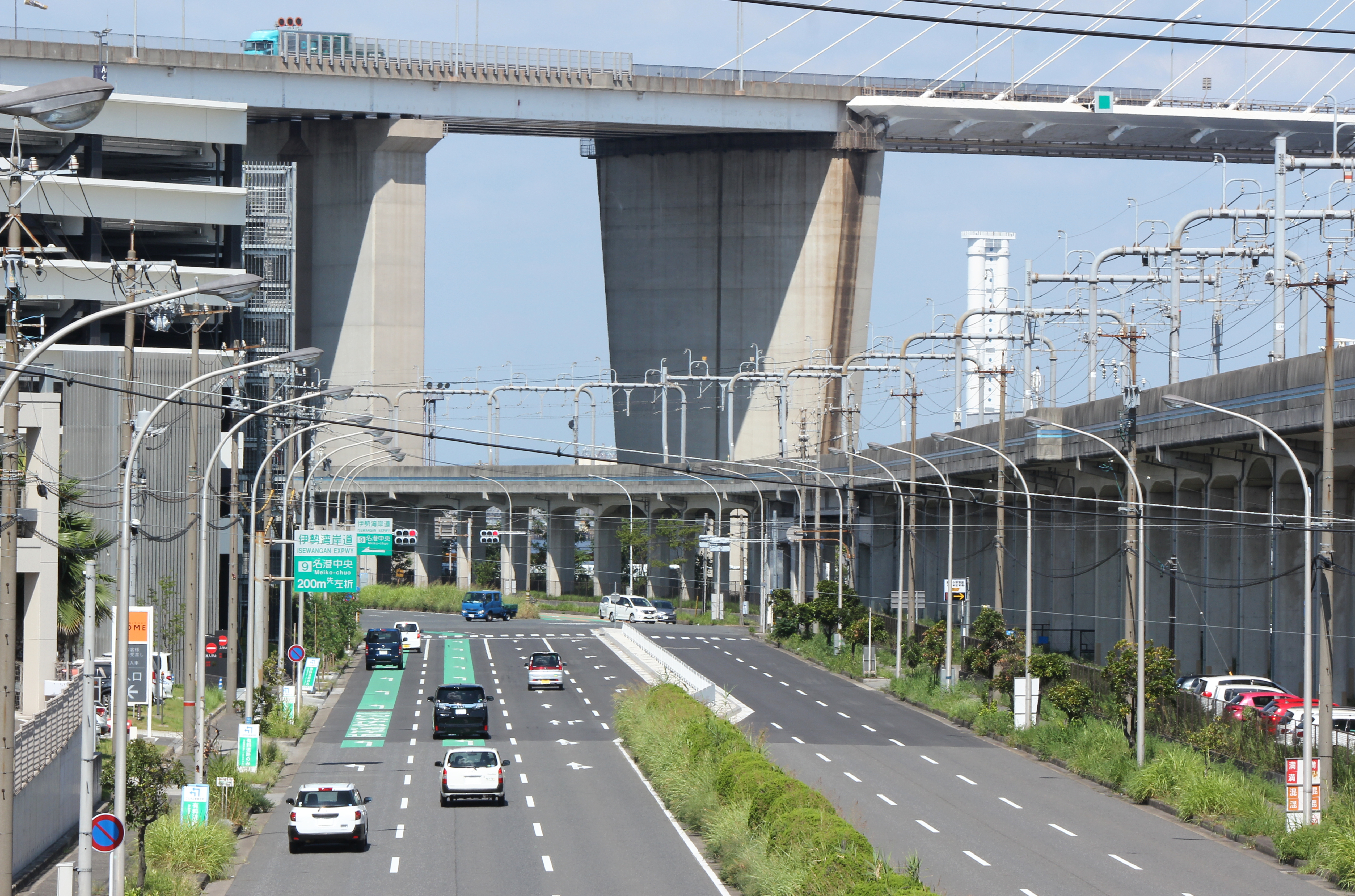 金城ふ頭の伊勢湾岸道路、名港中央ICへの取り付け道路